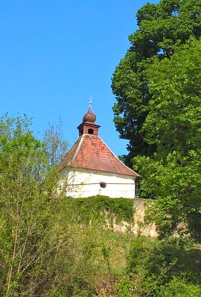 Barokk kápolna a Kálvária-dombon, Szendrőben.